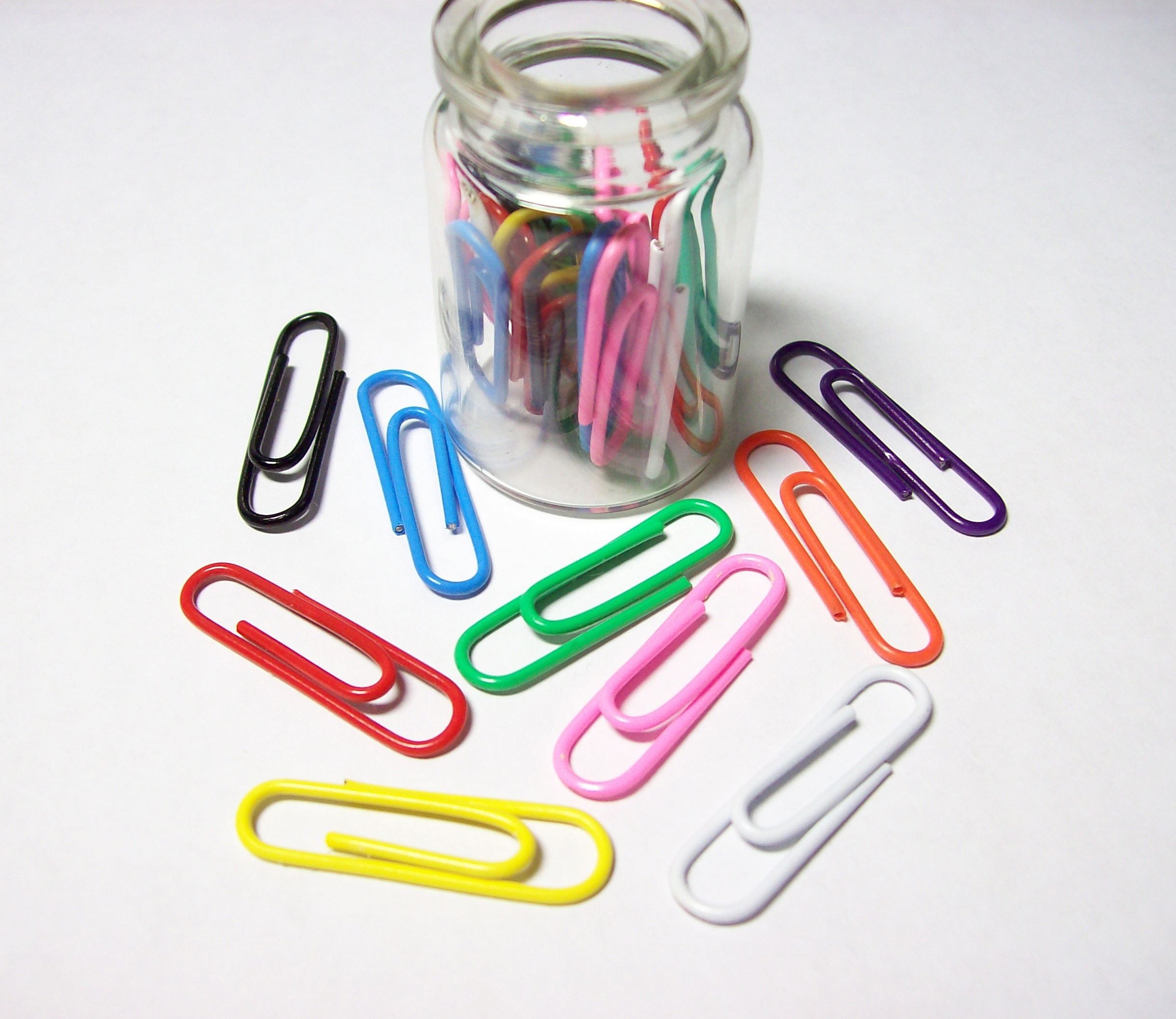 回形针（paper clip）